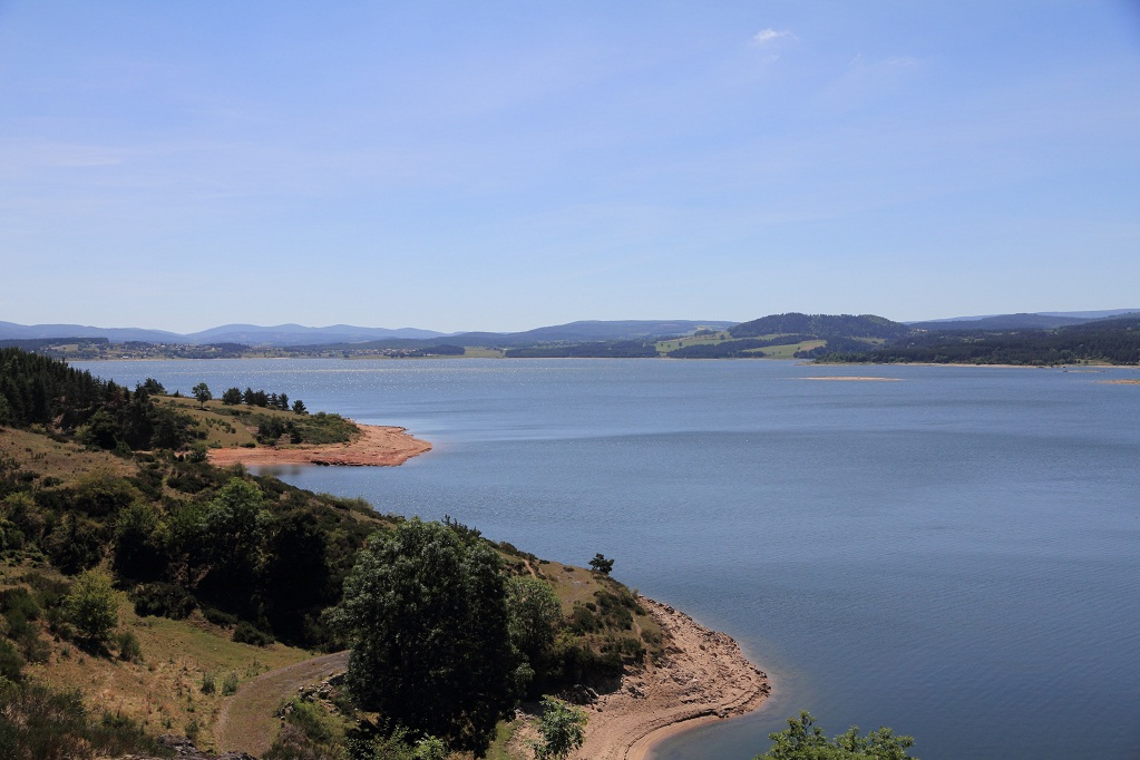 Le lac de Neussac en août 2011, Lozère, France.